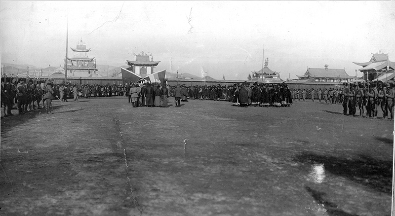 中文（中国大陆）: 外蒙古撤销自治仪式 Монгол: Монголын өөртөө эзэрхэх засгийн устгасан тухай ёслол. Нийслэл Хүрээ